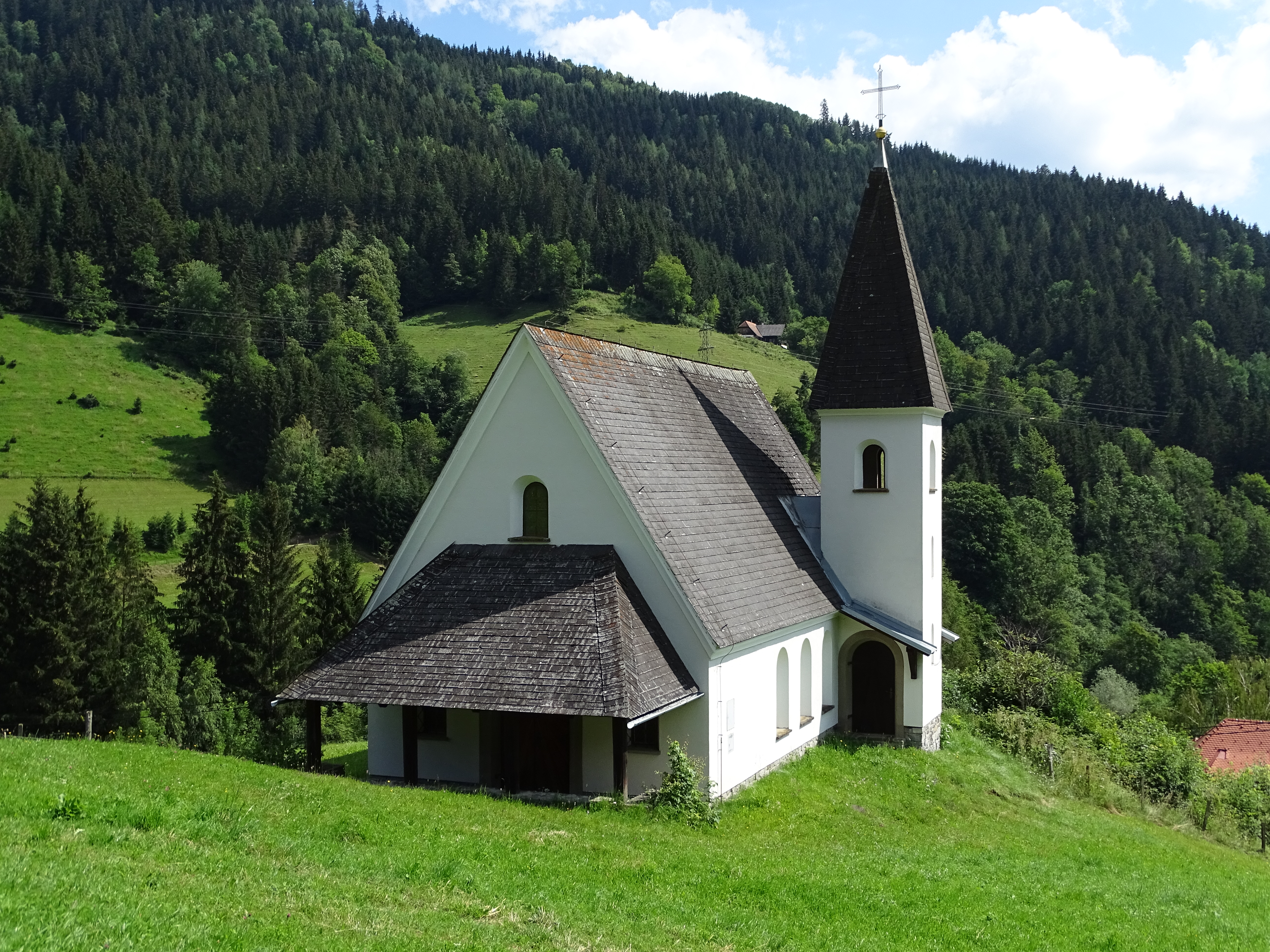 Die Kirche in Neuhof in der Gemeinde Übelbach